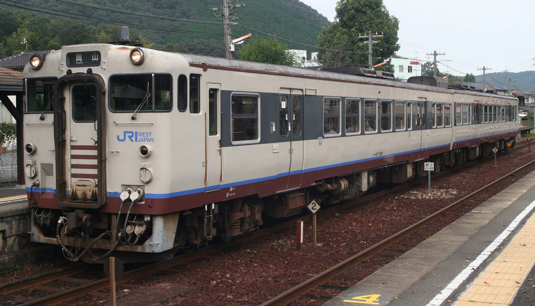 JR西日本キハ47形1038 津山線、野々口駅にて